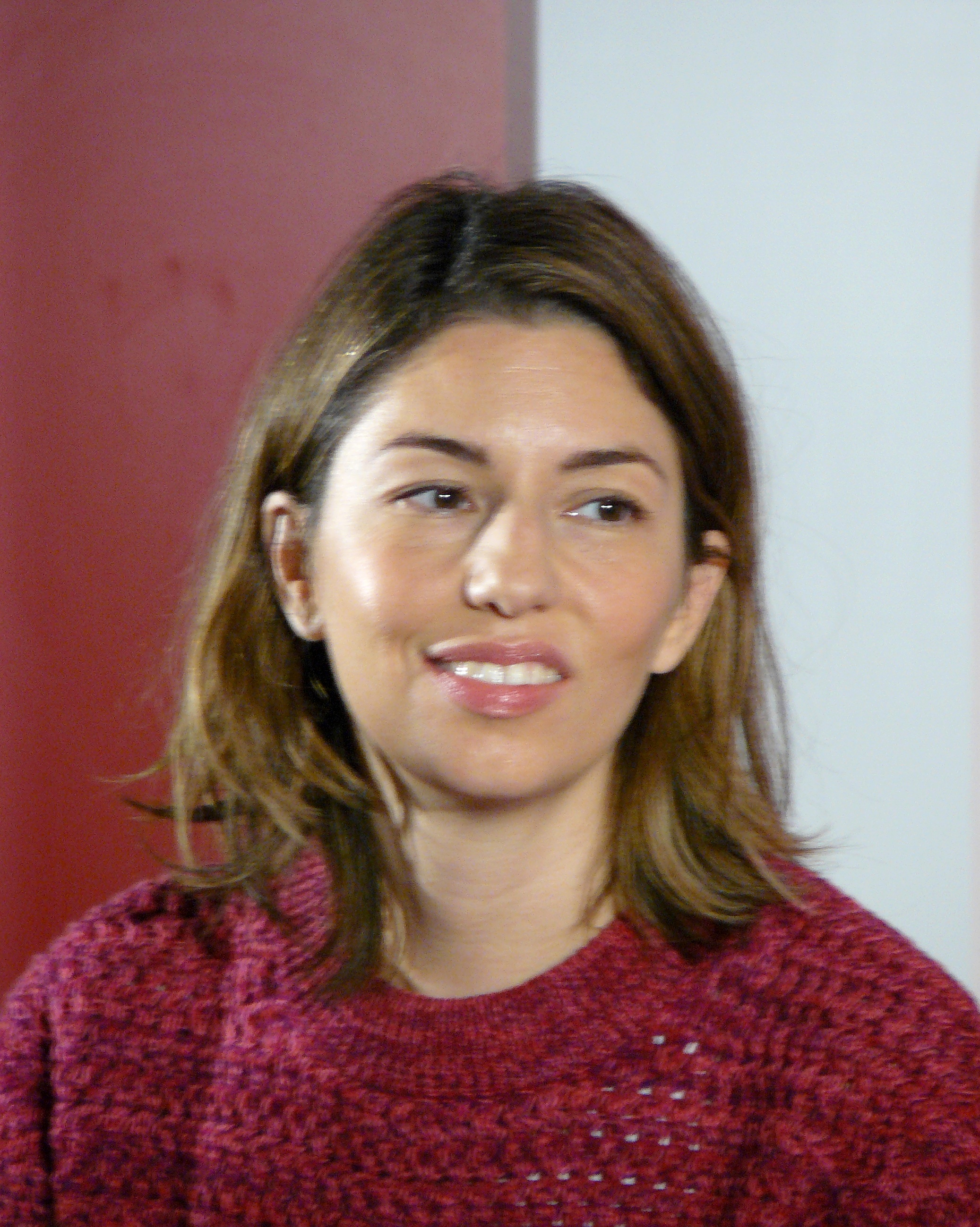 Sofia Coppola, le 7 novembre 2010 à la FNAC Montparnasse, lors d'une rencontre Masterclass à l'occasion de la sortie en janvier 2011 de son dernier film Somewhere.